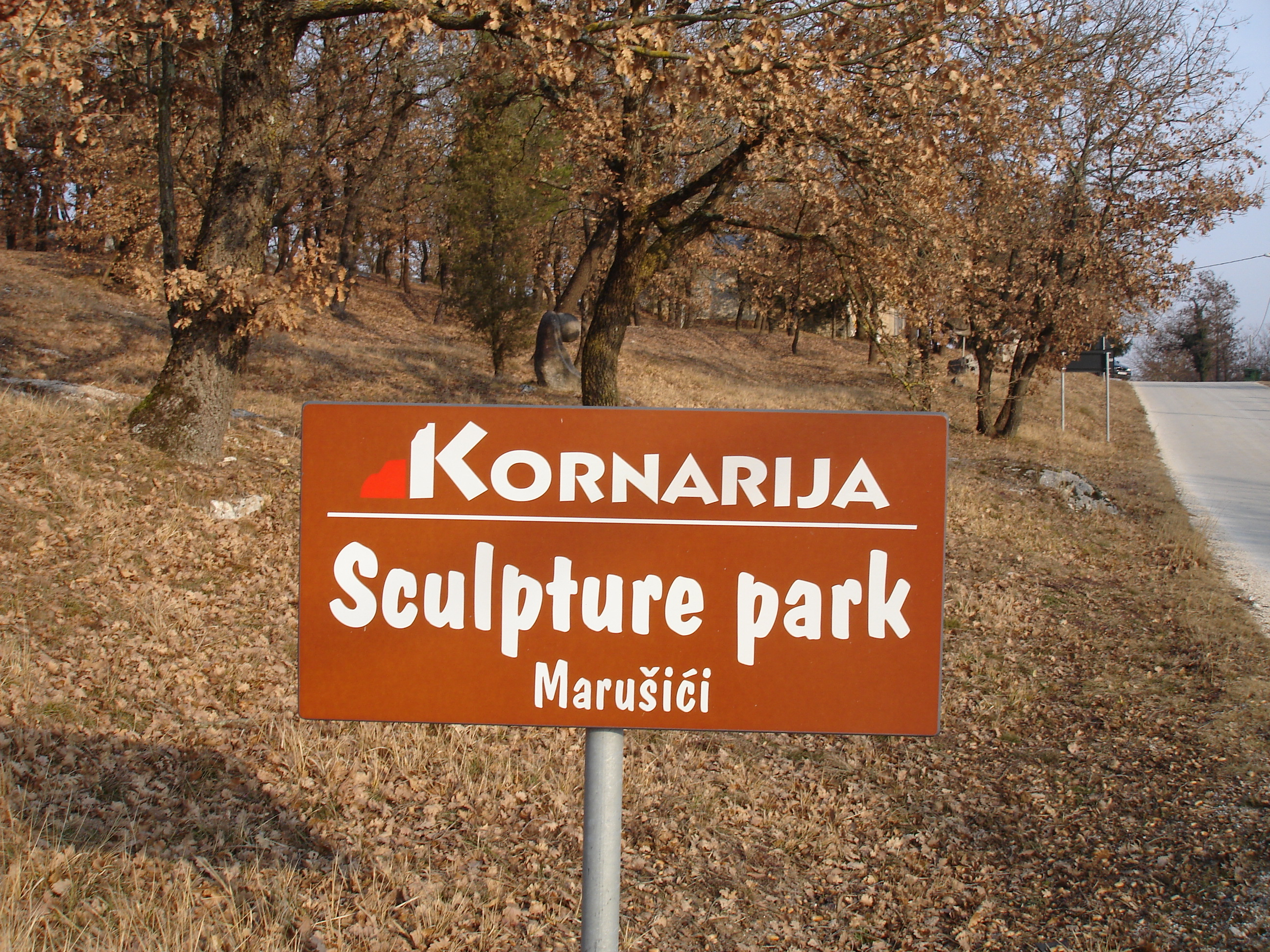 Park skulptura u Marušićima, Istra; natpis na ulazu u park; uz cestu Ž5007: Buje – Šterna – Oprtalj Sculpture park near Marušići, Istria, Croatia (road Ž5007: Buje – Šterna – Oprtalj)